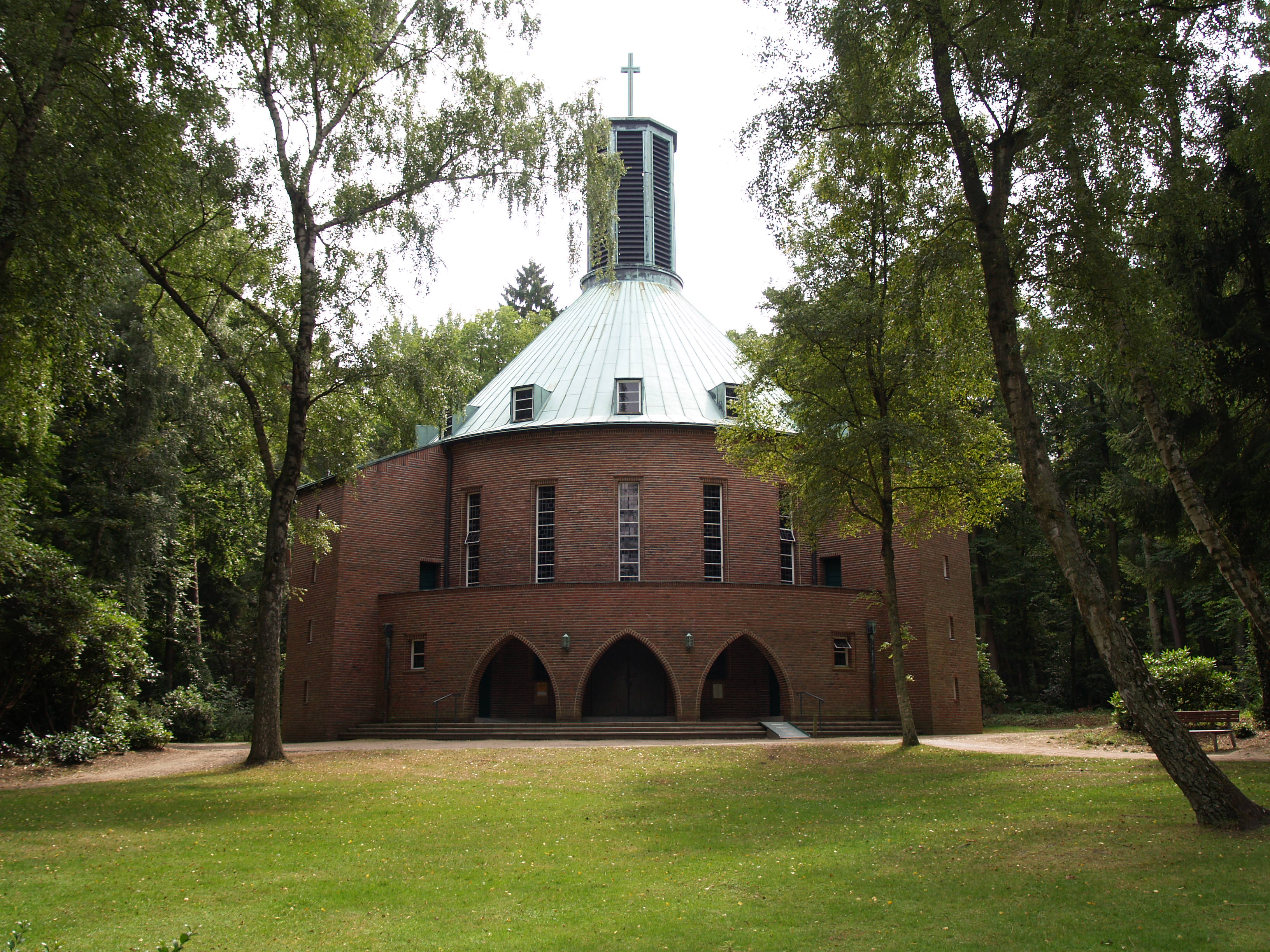 Bismark-Gedächtnis-Kirche in Aumühle, Kreis Herzogtum Lauenburg, Deutschland